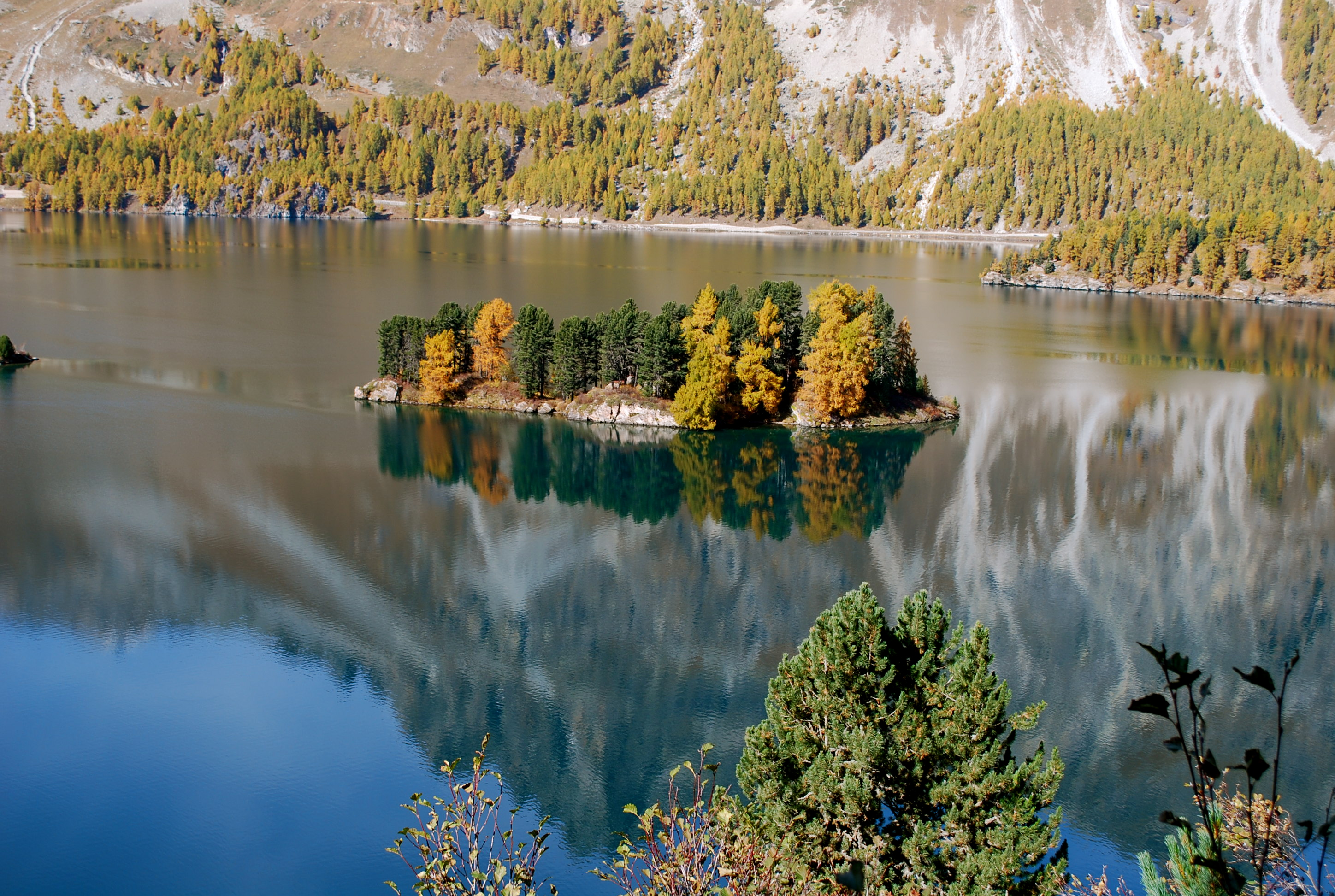 Chaviolas, Silsersee/Laj da Segl